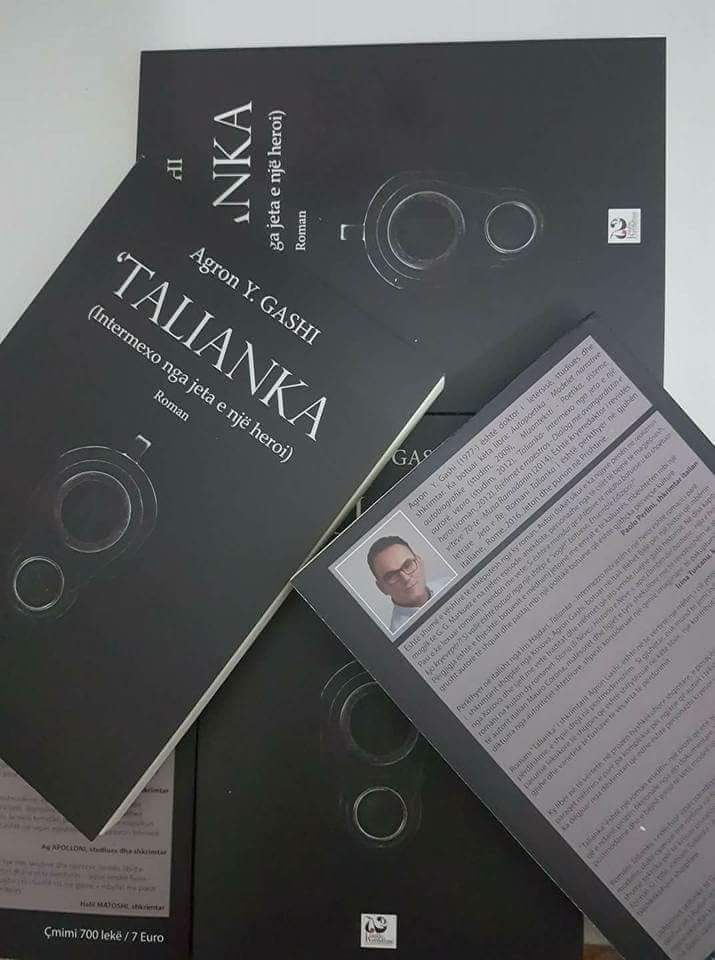 Liber i Agron Y. Gashi